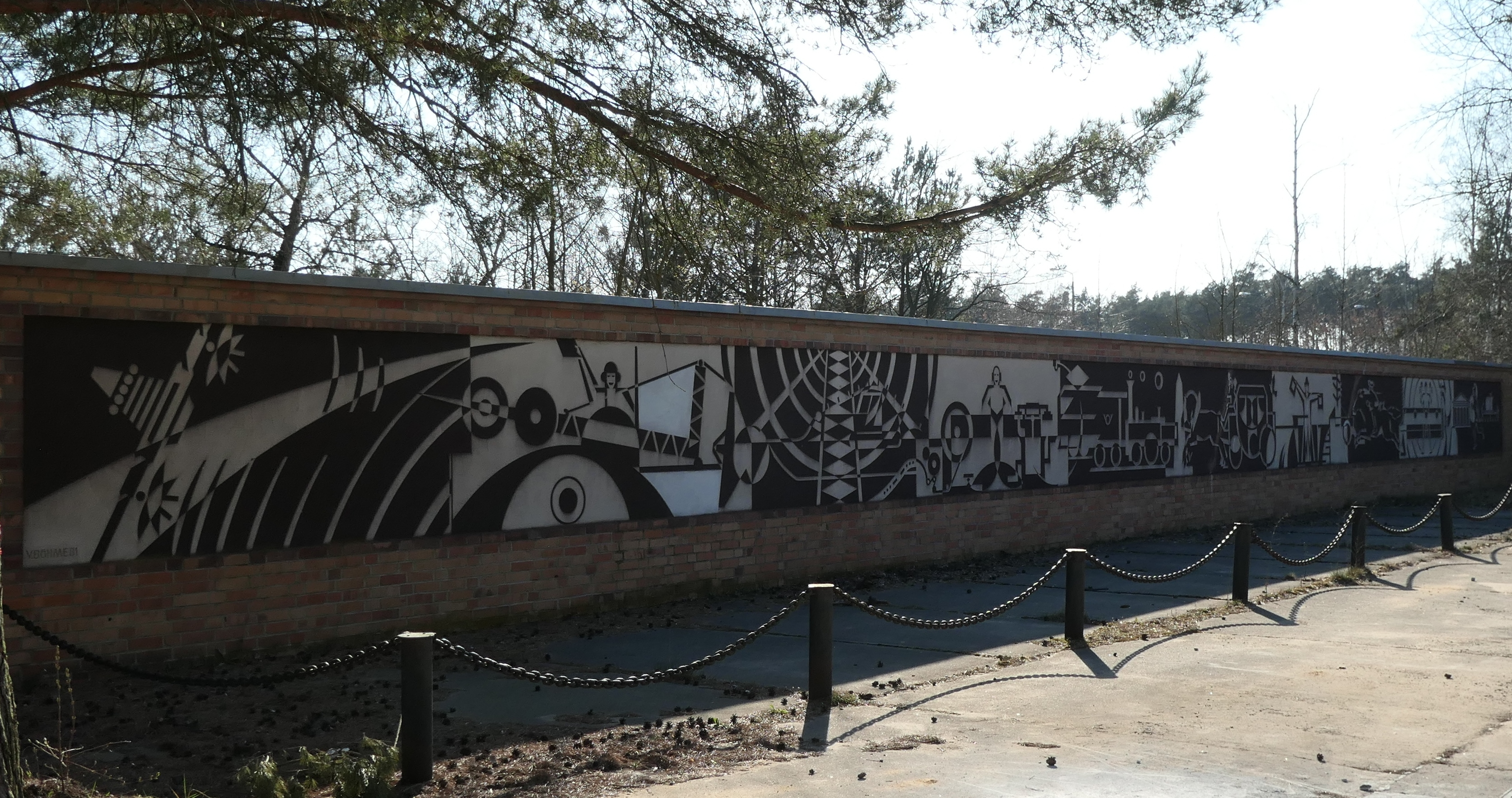 Denkmalgeschützte Wandbild Geschichte der Nachrichtenübermittlung inLudwigsfelde, total